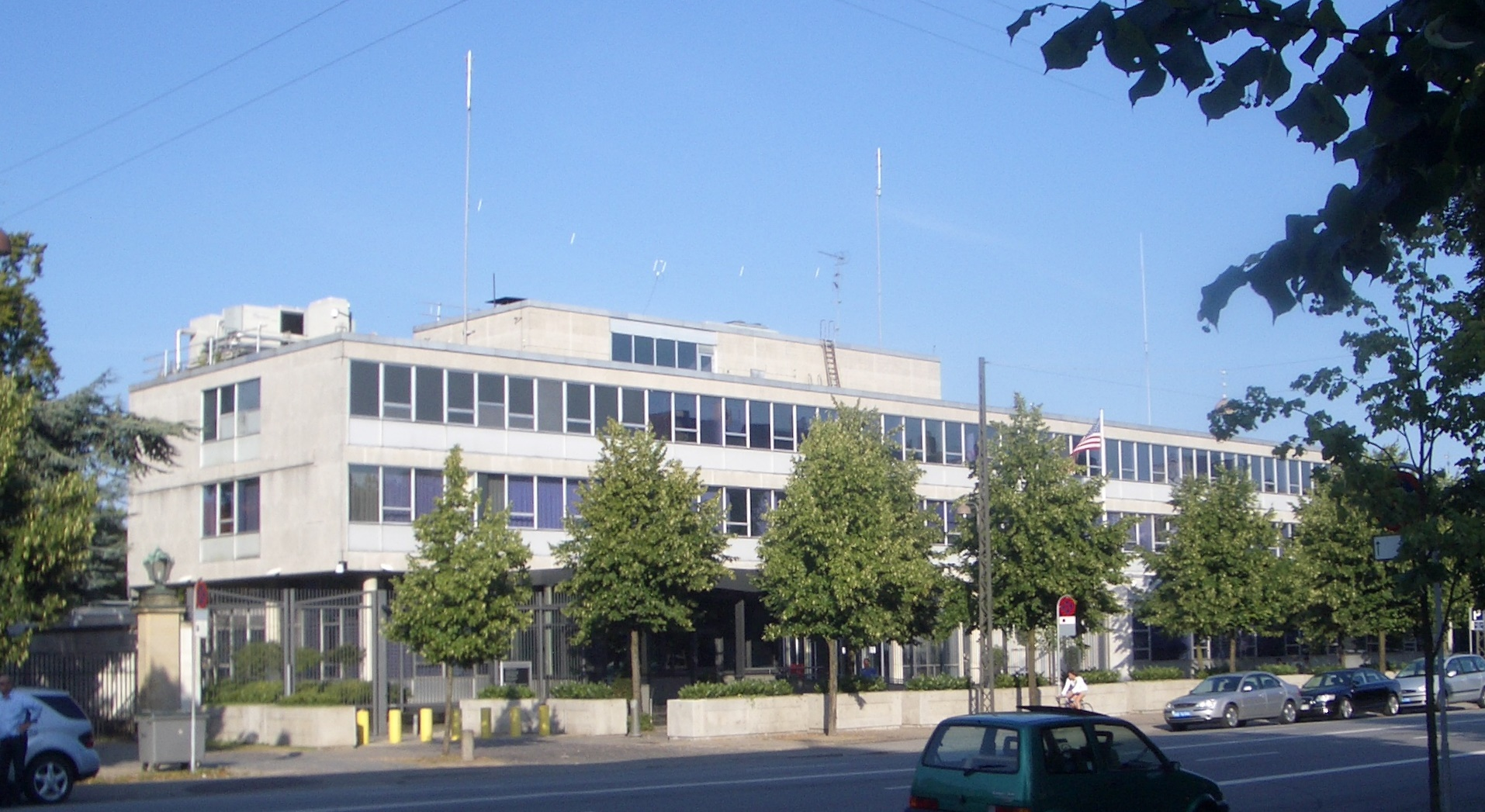 Den amerikanske ambassade i København / The American embassy of Copenhagen, Denmark